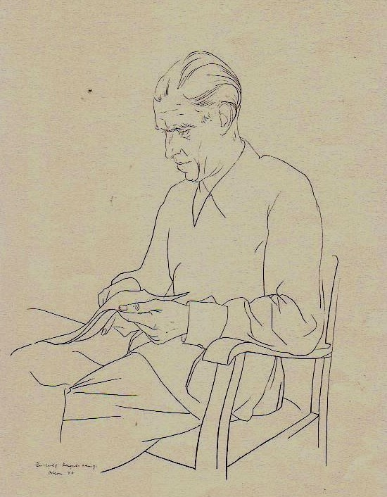 Rudolf Hagelstange